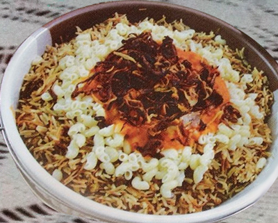 كشري - طبق مصري